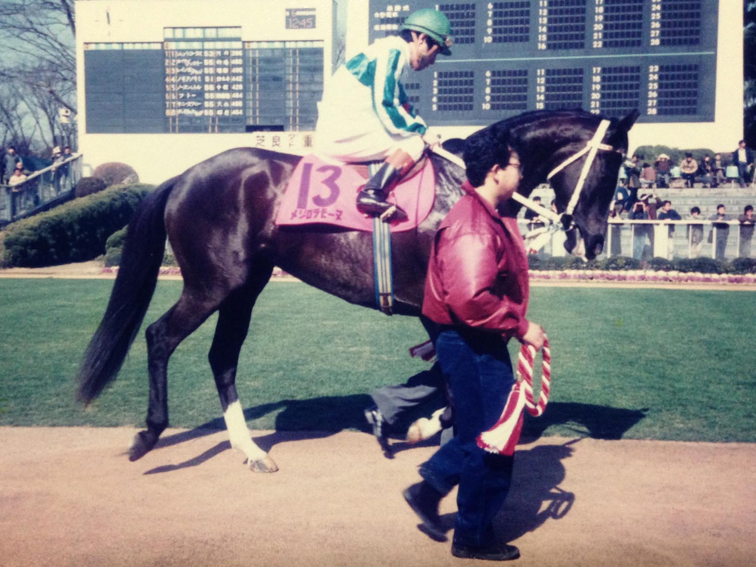 1987年2月7日、東京競馬場にて引退式